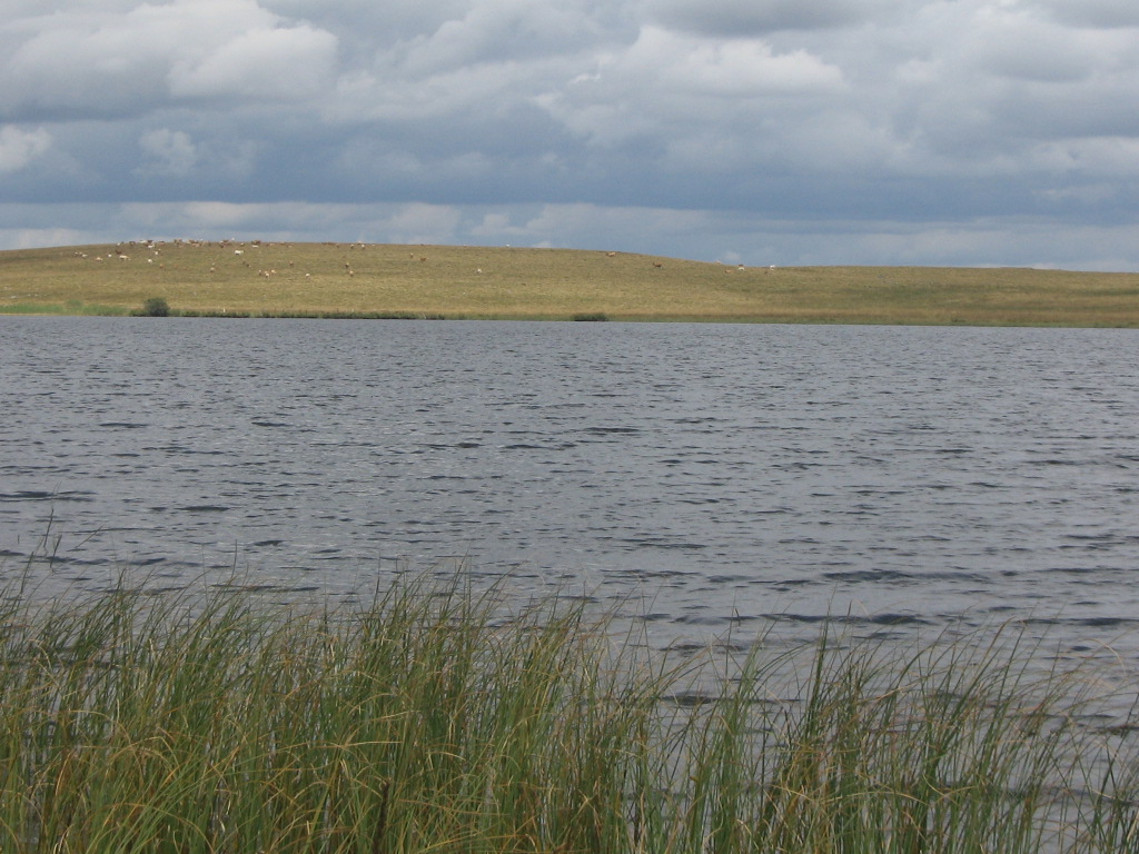 Aperçu du lac de Saint Andéol (Aubrac)